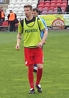 Jugador del Girona FC